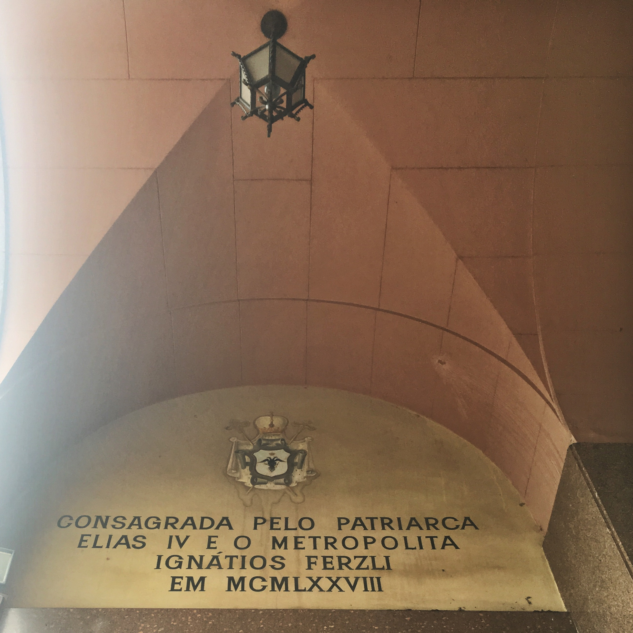 Detalhe porta de entrada principal.